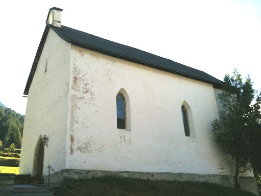 reformierte Kirche San Bastian in Zernez, Kanton Graubünden